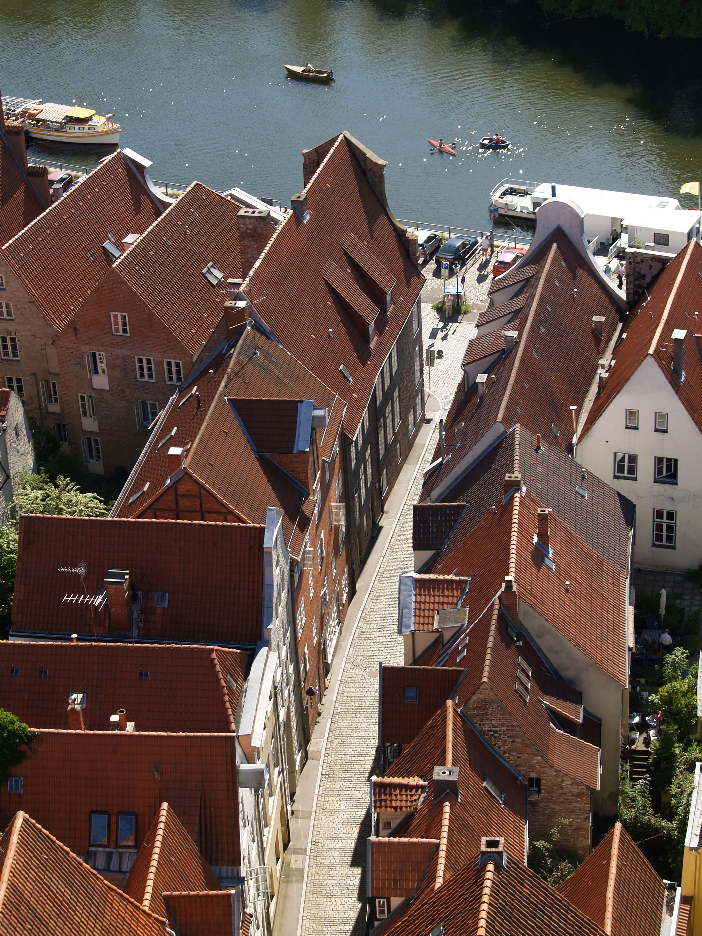 Blick über die Dächer von Lübeck von St. Petri aus nach Westen